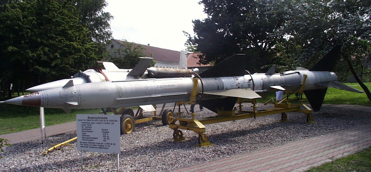 Flugabwehrraketen für große Höhen